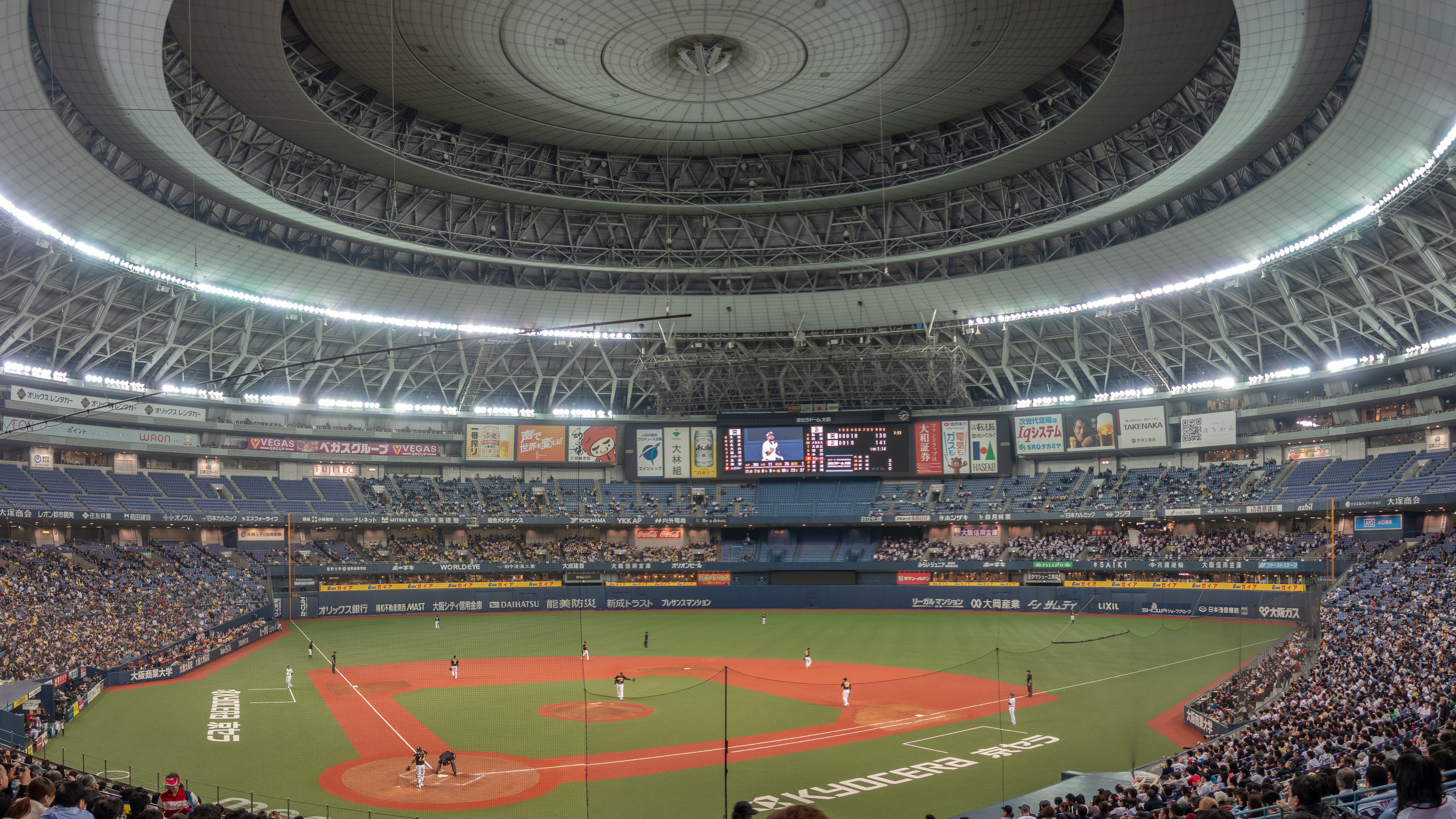 阪神×オリックスのオープン戦。京セラドーム大阪にて。